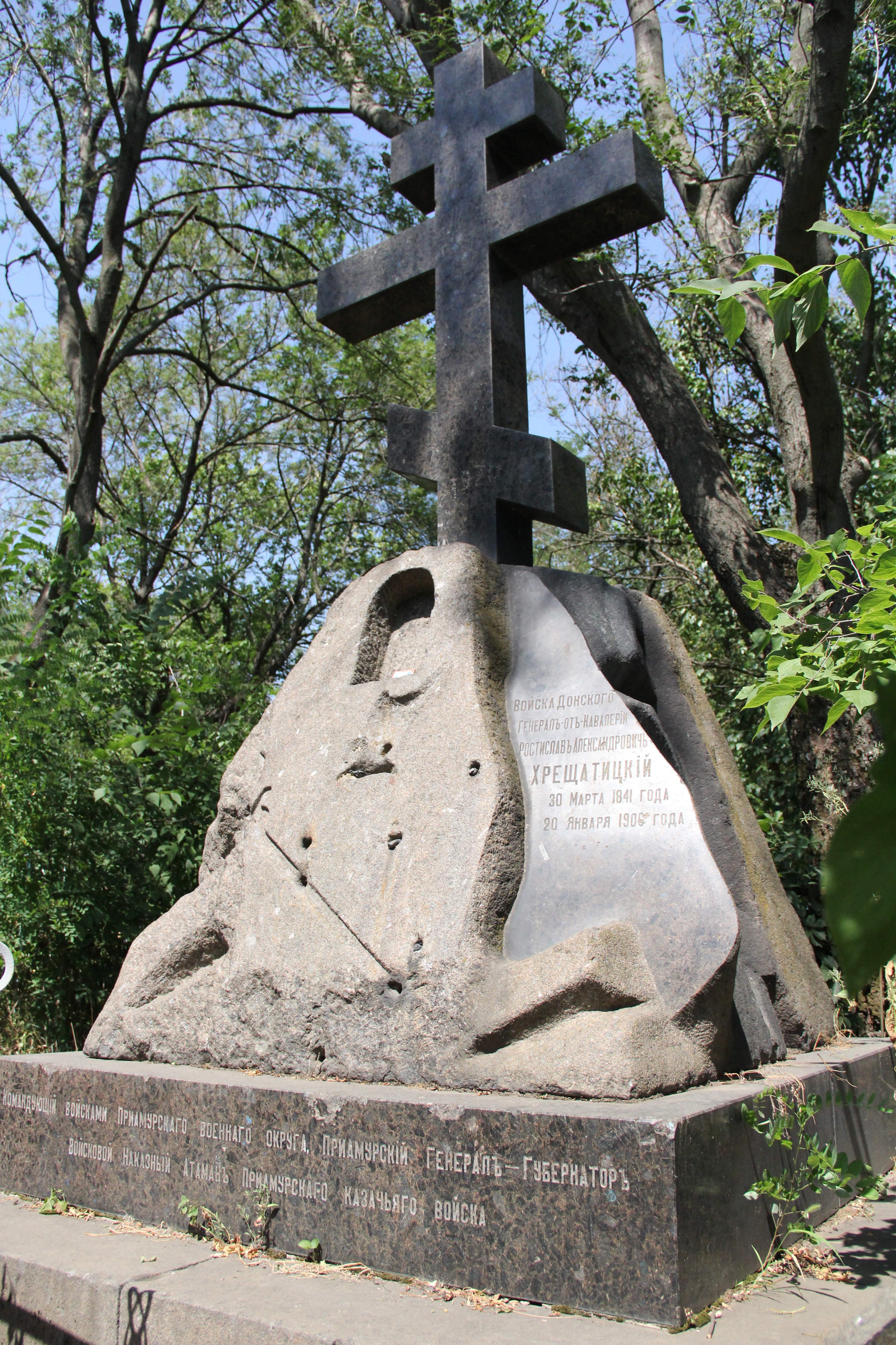 Памятник на месте захоронения Командующего войсками Приамурского округа, Приамурского генерал-губернатора, Войскового наказного атамана Приамурского казачего войска, Войска Донского Генерала от Кавалерии Ростислава Александровича Хрещатицкого